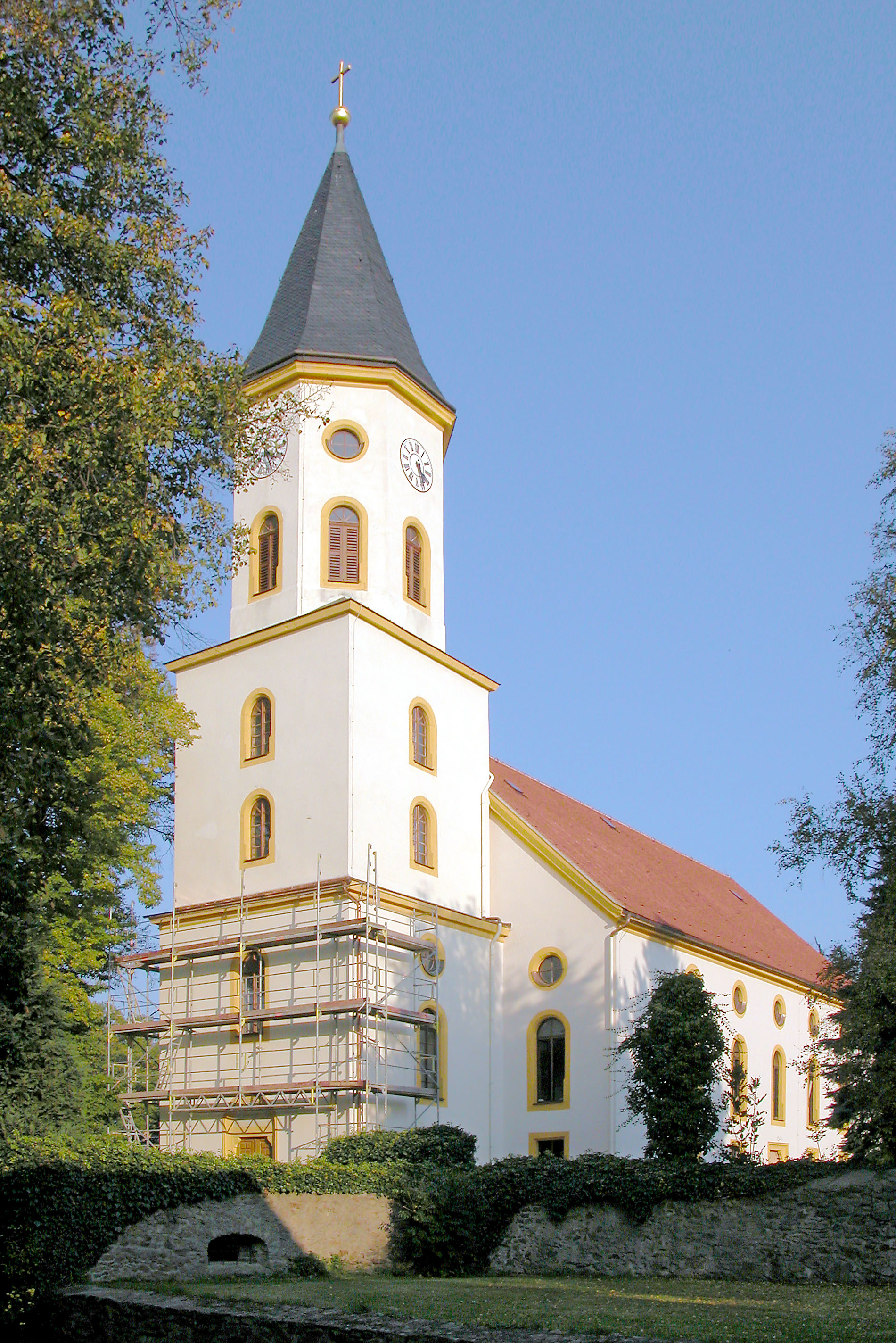 11.10.2005 01454 Lomnitz (Wachau), Kirchweg: Dorfkirche (GMP: 51.189676,13.900311) erstmales 1495 erwähnt. Heutige Kirche von 1840/41 durch Baumeister Christian Gottlieb Ziller neu errichtet. [DSCN7759.TIF]20051011110DR.JPG(c)Blobelt